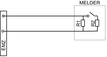 Gleichstromtechnik